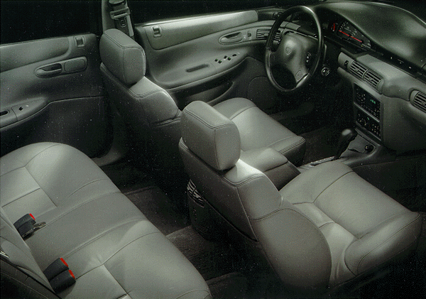 interior